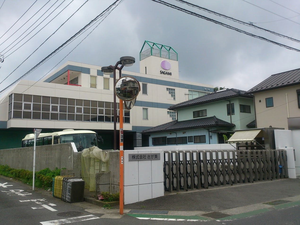 さが美本社（平塚市）